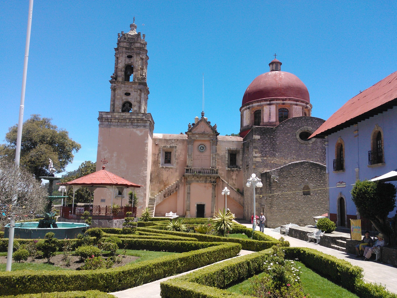 Estado De Hidalgo, Mineral Del Chico